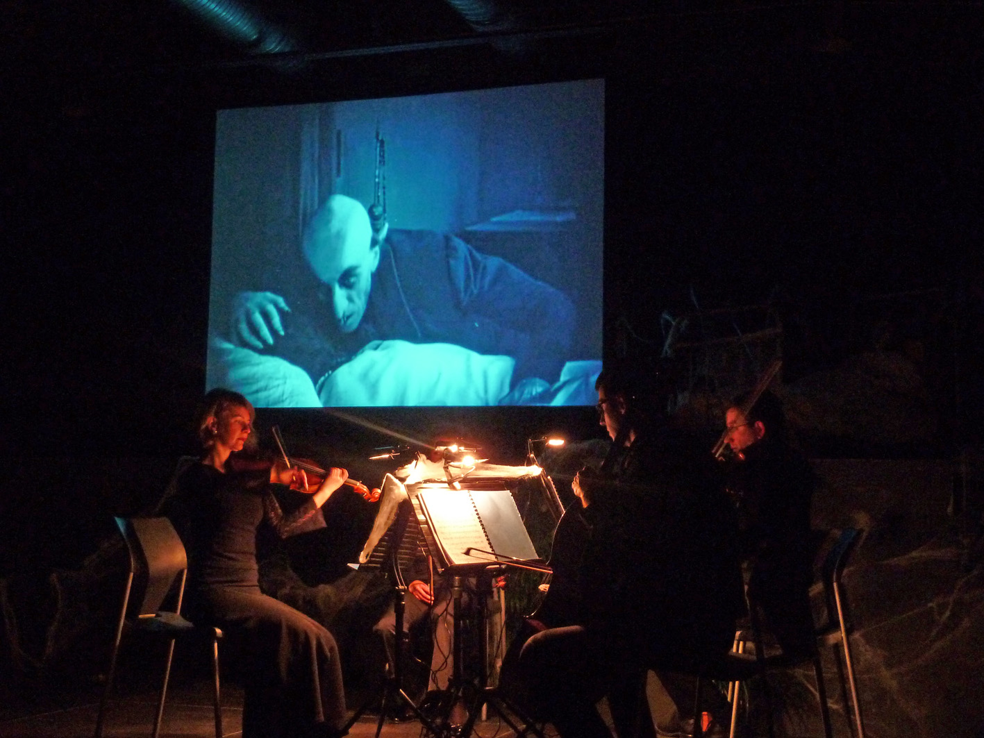 Le Quatuor Prima Vista accompagne le "Nosferatu" de Murnau sur la musique de Baudime Jam.